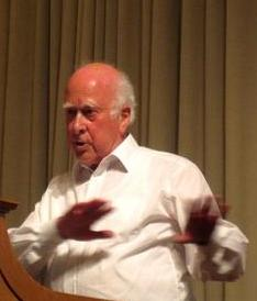 Peter Higgs (* 1929)